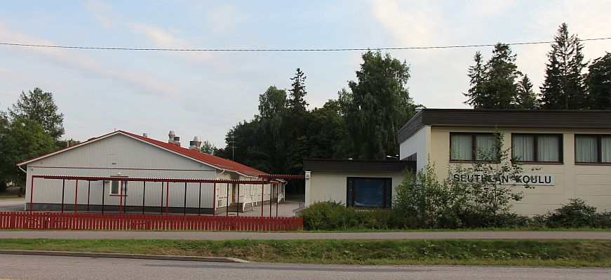 Seutulan koulu Vantaan Seutulassa. Huom: Muista säilyttää viittaus kuvaajaan, mikäli käytät kuvaa.